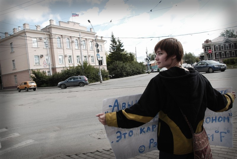 Одиночный пикет у здания Ленинского районного суда города Томска в день первого судебного заседания по делу о признании книги "Бхагавад-гита как она есть" экстремистским материалом.